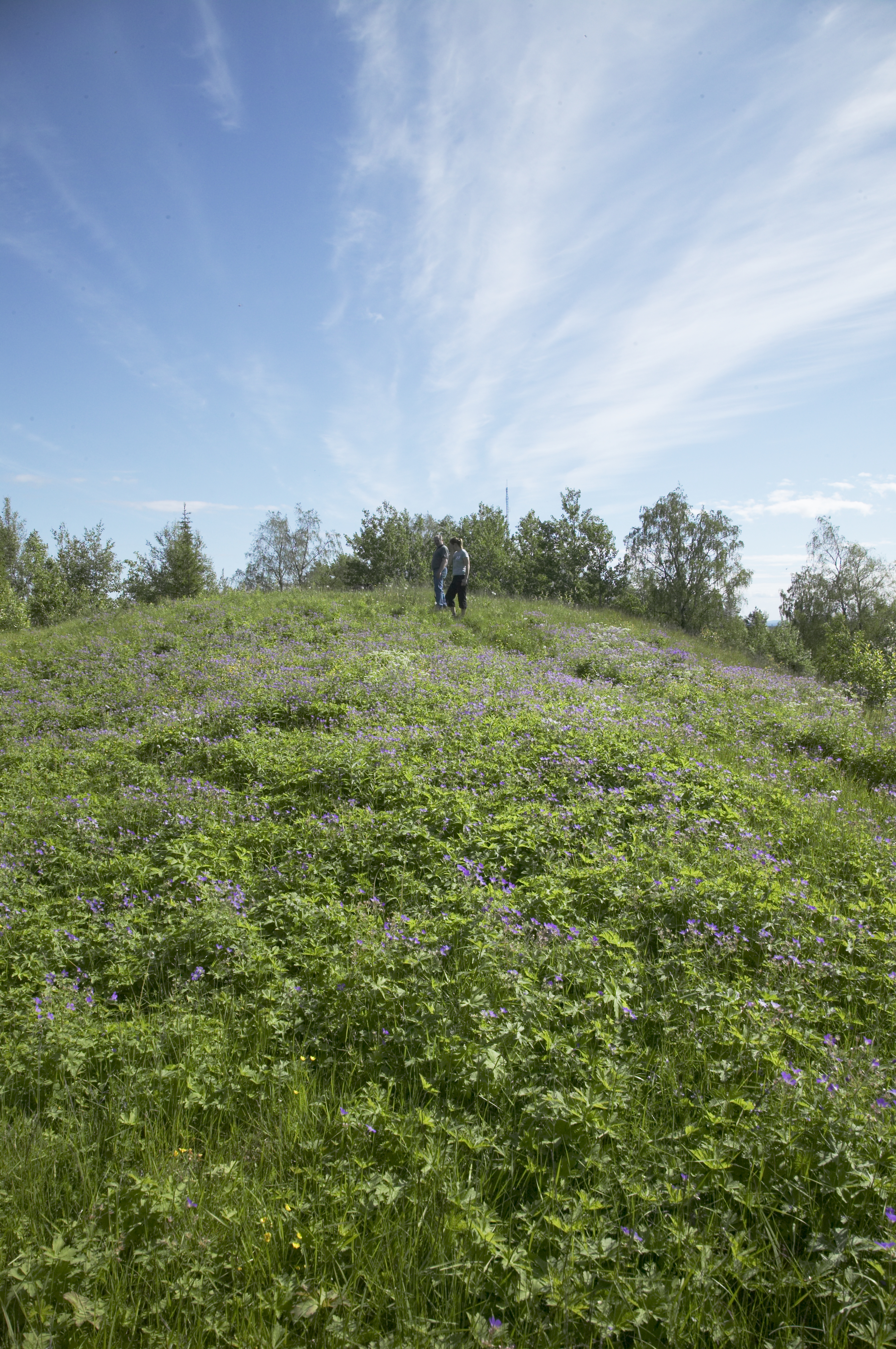 Jupukka. Motiv: Struves meridianbåge Nyckelord: Naturreservat, Världsarv Kategori: Skogslandskap Jupukka.